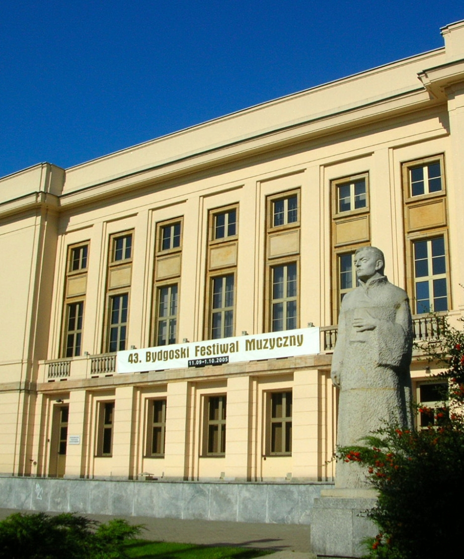 Filharmonia Pomorska w Bydgoszczy